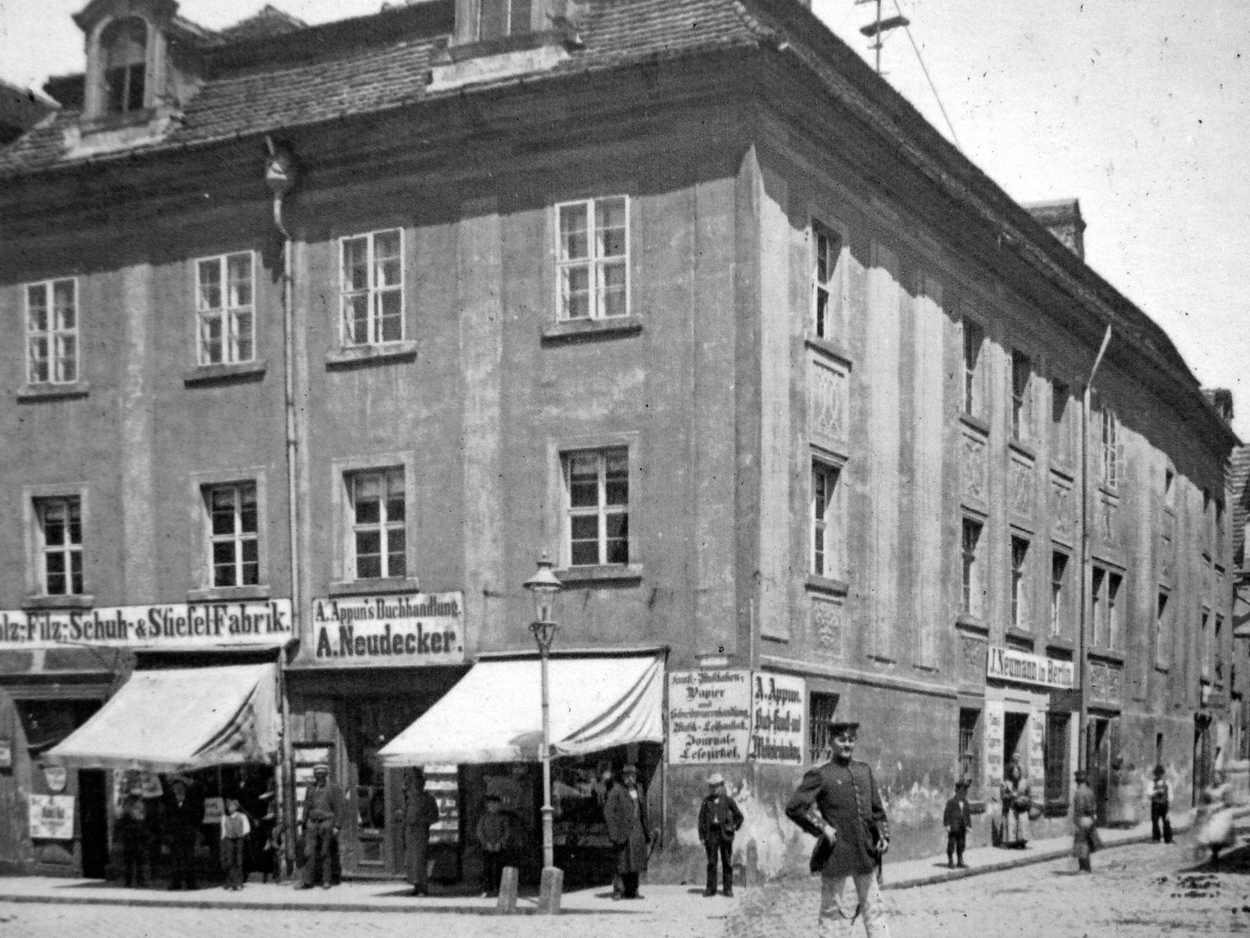 Dom w którym urodził się K. F. Appun - niemiecki podróżnik i badacz Ameryki Południowej. Zburzony w 1897 r.